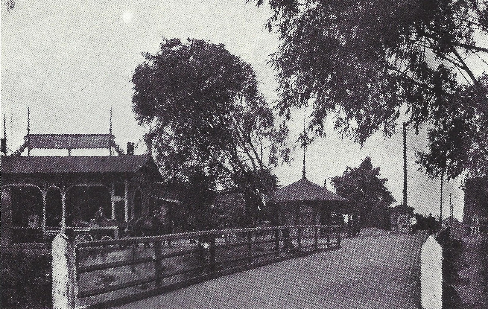 Fotografie des Samlandbahnhofs in Königsberg in Ostpreußen.